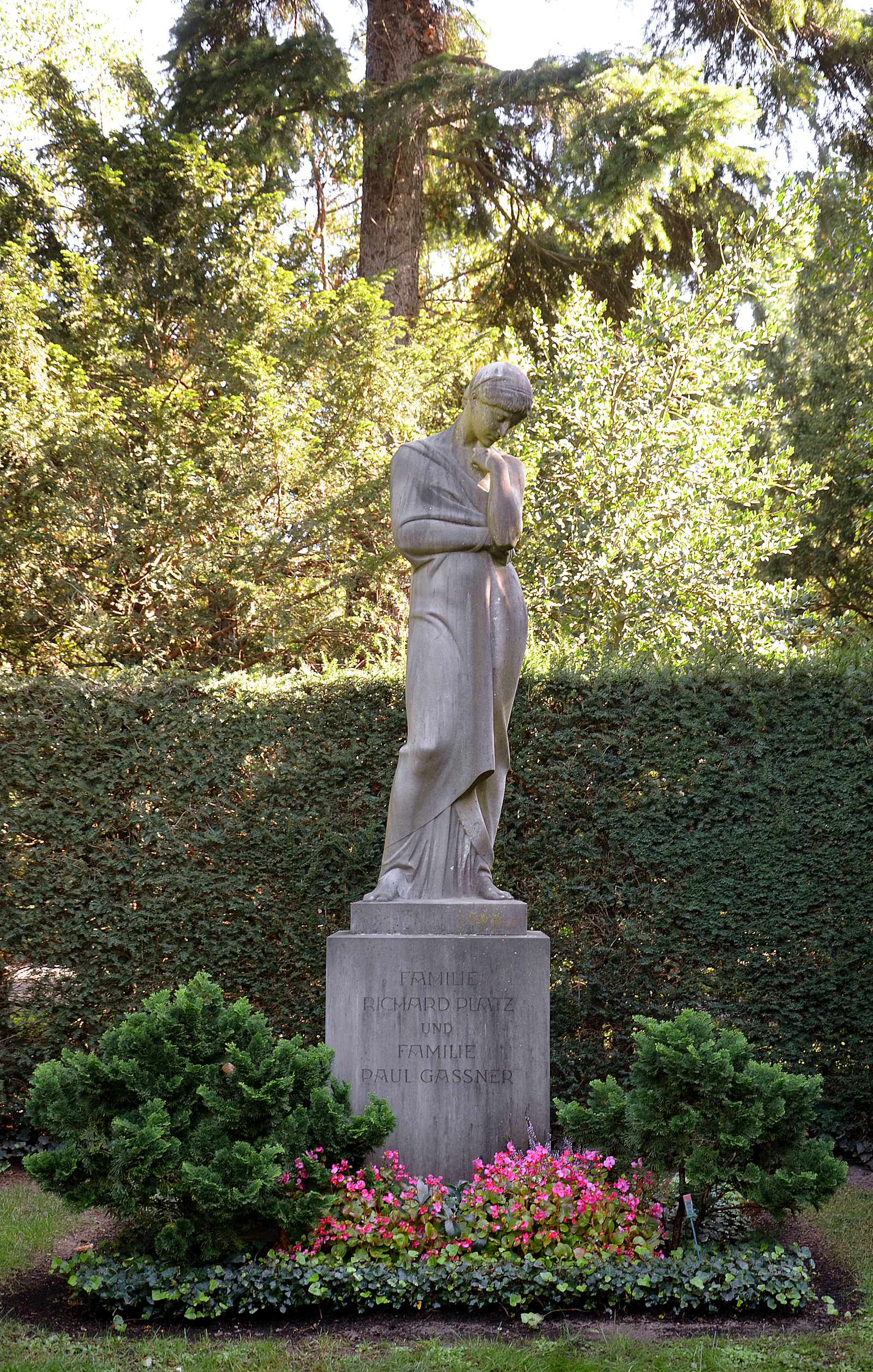 Vorderansicht des von dem Bildhauer Oskar Garvens geschaffenen Grabmals für die „Familie Richard Platz / Familie Paul Gassner“ auf dem Stadtfriedhof Engesohde in Hannover ...